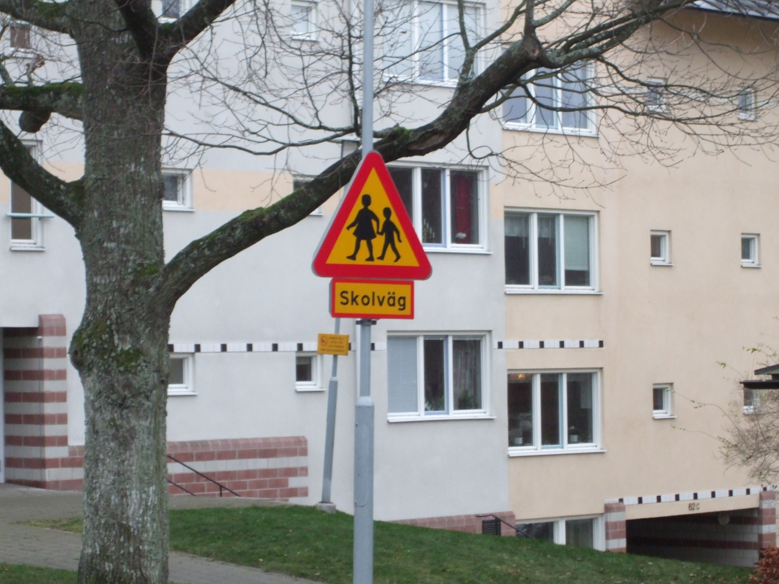 "Skolväg" roadsign in Sweden